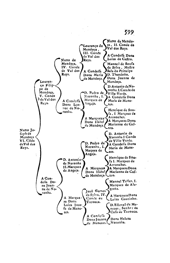 Página 599 das "Memorias Historicas e Genealogicas dos Grandes de Portugal", 3.a edição ― Costados dos Condes de Vale de Reis